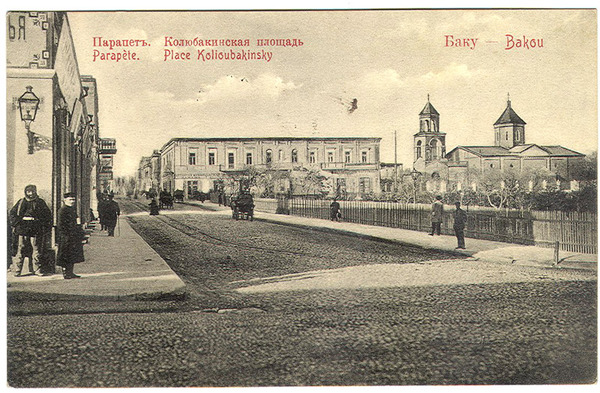 Баку: Колюбакинская площадь ("Парапет") и армянская церковь Святого Григория Просветителя Baku: Kolyubakinskaya square ("Parapet") and the Armenian Church of Saint Gregory the Illuminator. Russian postcard